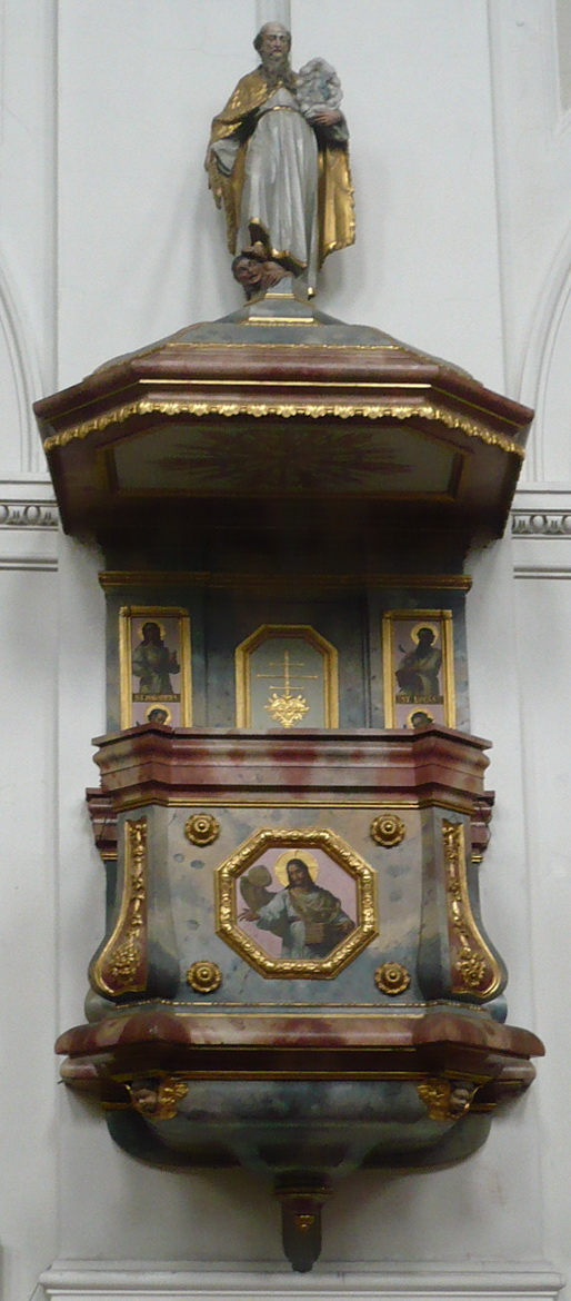 Kanzel in der Kirche St. Theresia in München